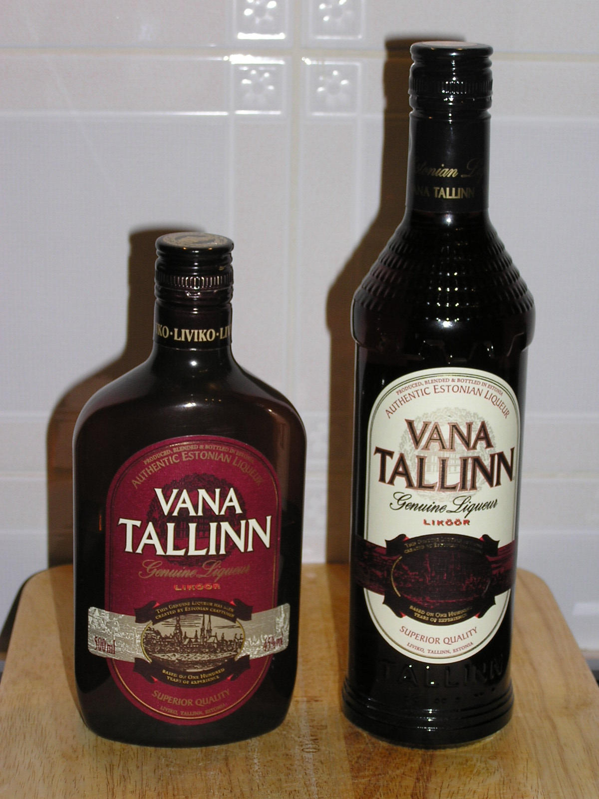 Autore:Luckyboy Fonte:Own work Descrizione: Vana Tallin bottles Licenza d'uso:vedi sotto